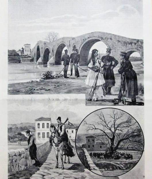 Το γεφύρι της Άρτας, ο πλάτανος και η Ελληνική και Τουρκική φρουρά στον Άραχθο,1897